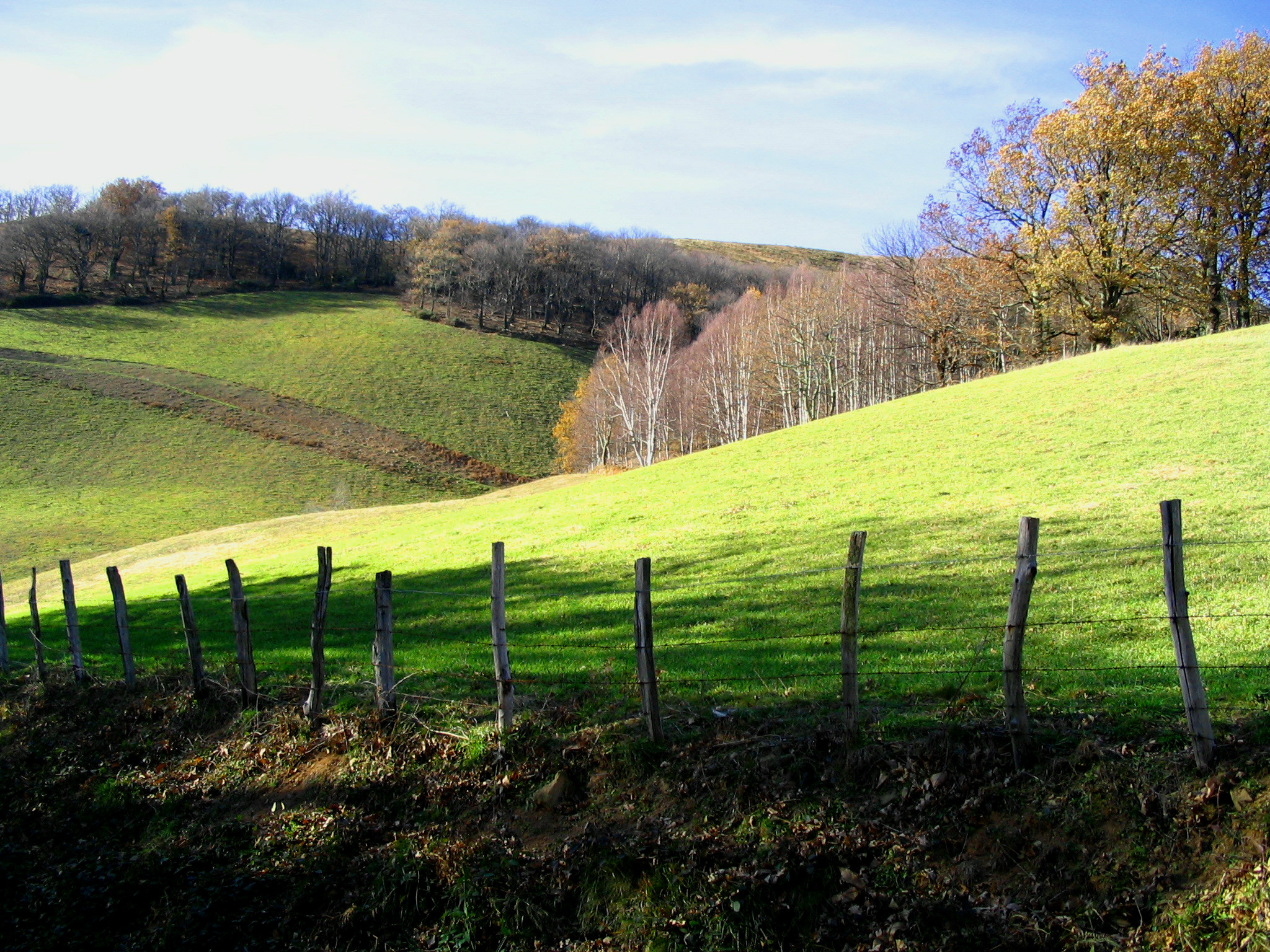 Paysage de Basse-Navarre - Atchuarrea - Pays Basque - Pyrénées Atlantiques - France Auteur/author: P.Charpiat - 2006